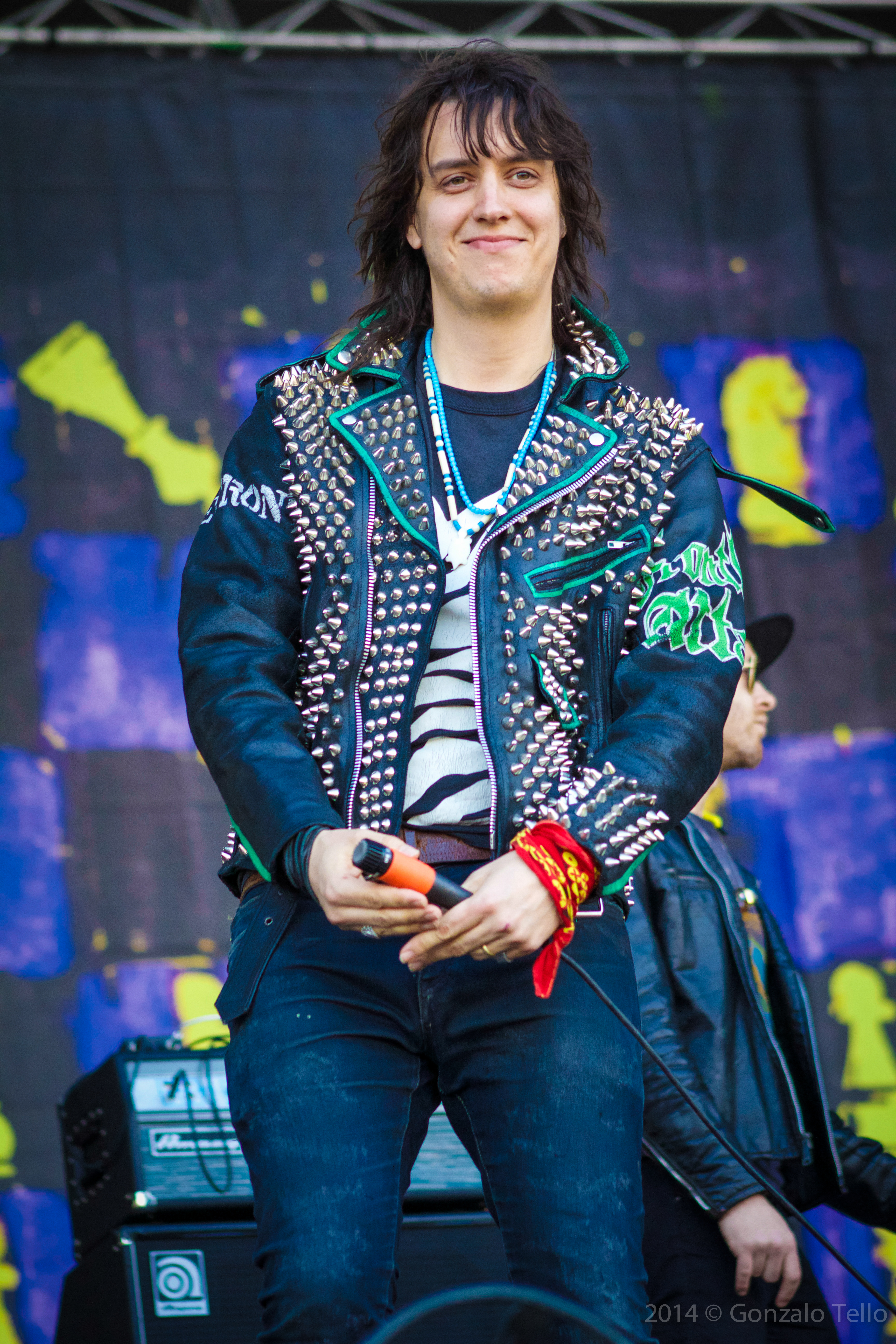 Foto: Gonzalo Tello